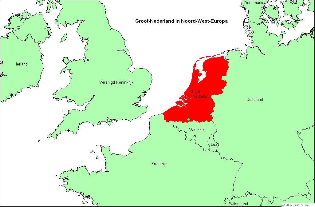 Groot-Nederland, ook wel Dietsland genoemd.